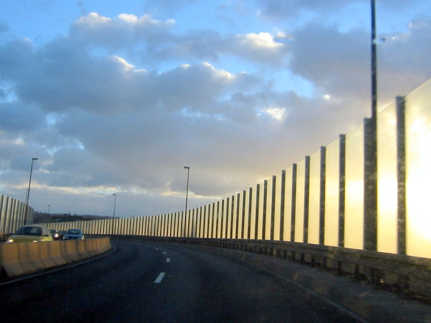 Lärmschutzwand der Überführungsstraße in Dresden